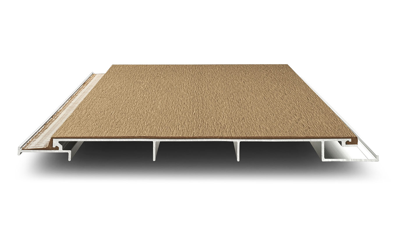 Bois hybride ou "Wood Hybrid Composite"